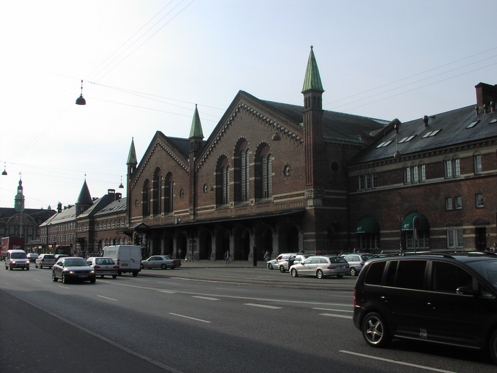 A koppenhágai főpályaudvar (miszerint Hovedbanegårdens ) a Bernstorffsgade felől nézve.